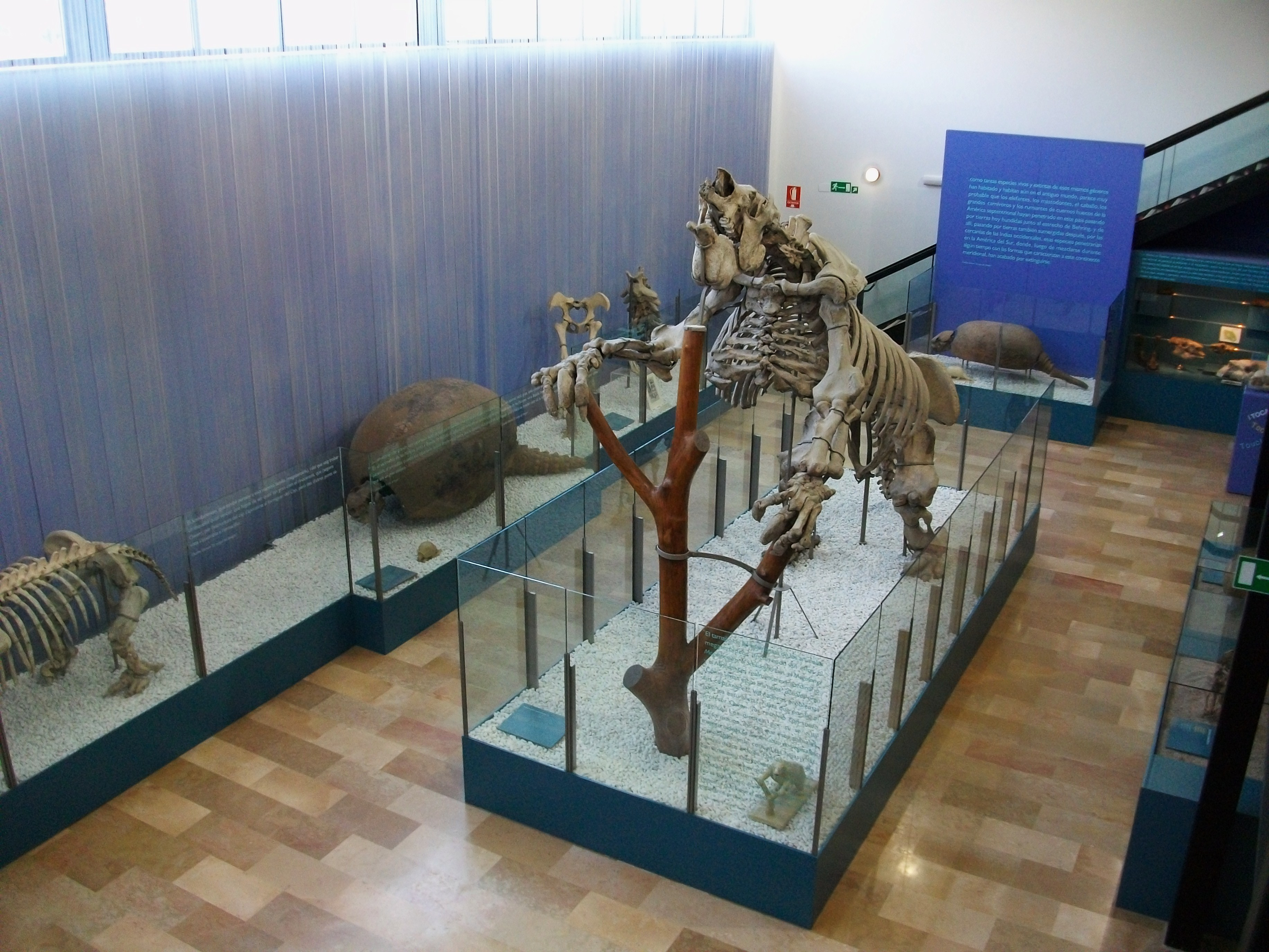 Museu de Ciències Naturals de València, amb el megateri al centre de la sala.